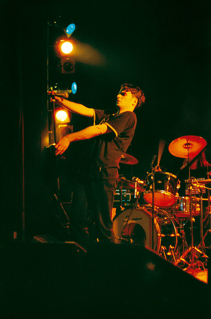 PRESING-20 X 2002